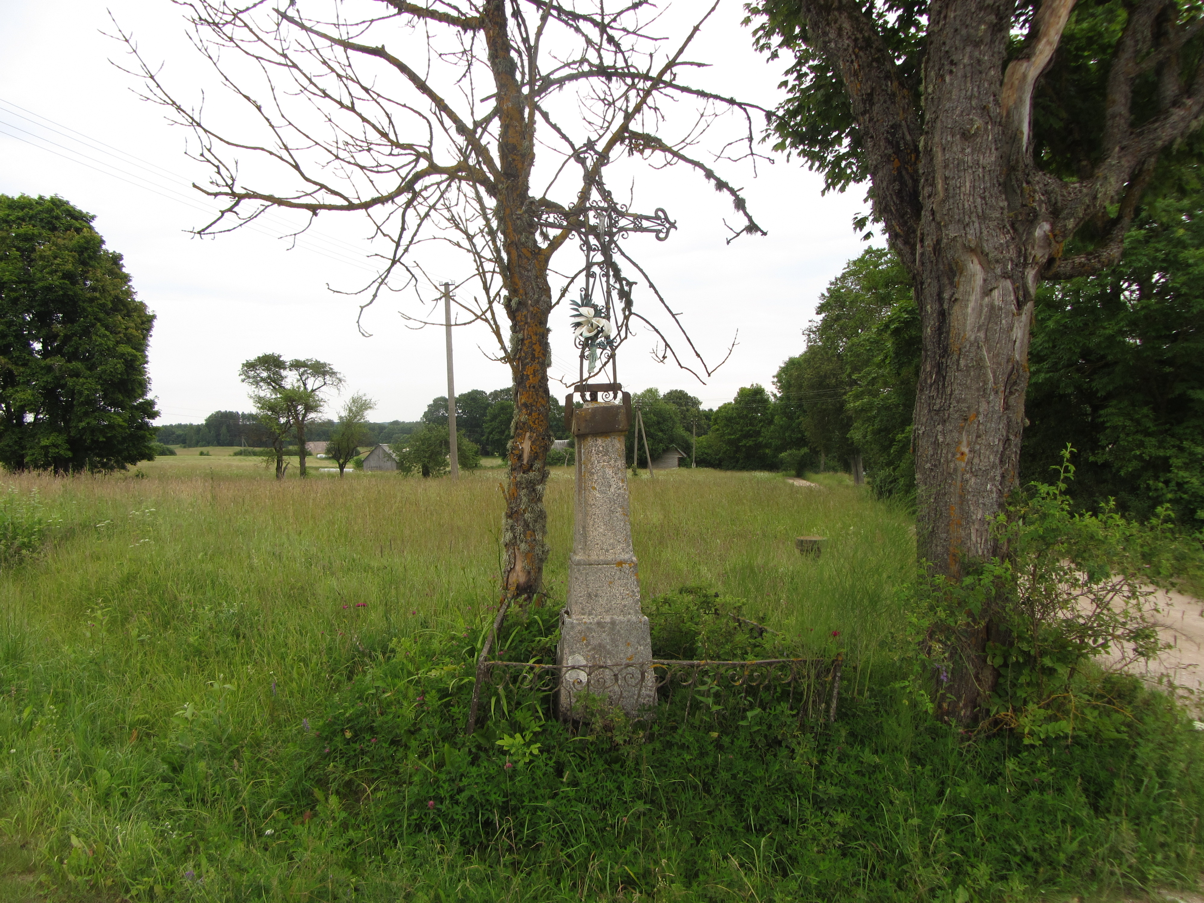 Pilkeniai, Lithuania